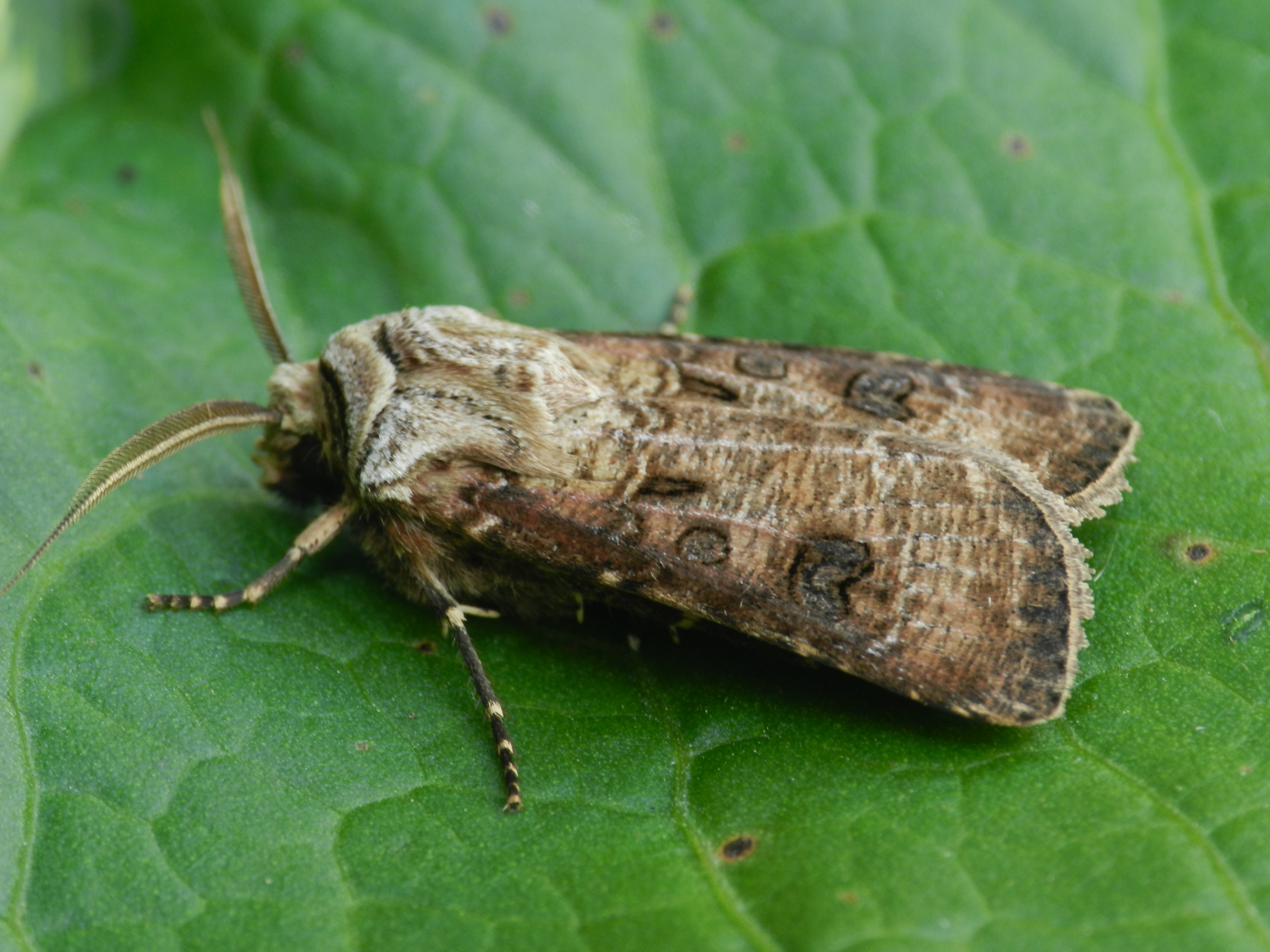 Agrotis clavis. Picture taken in Olsztyn, Poland.